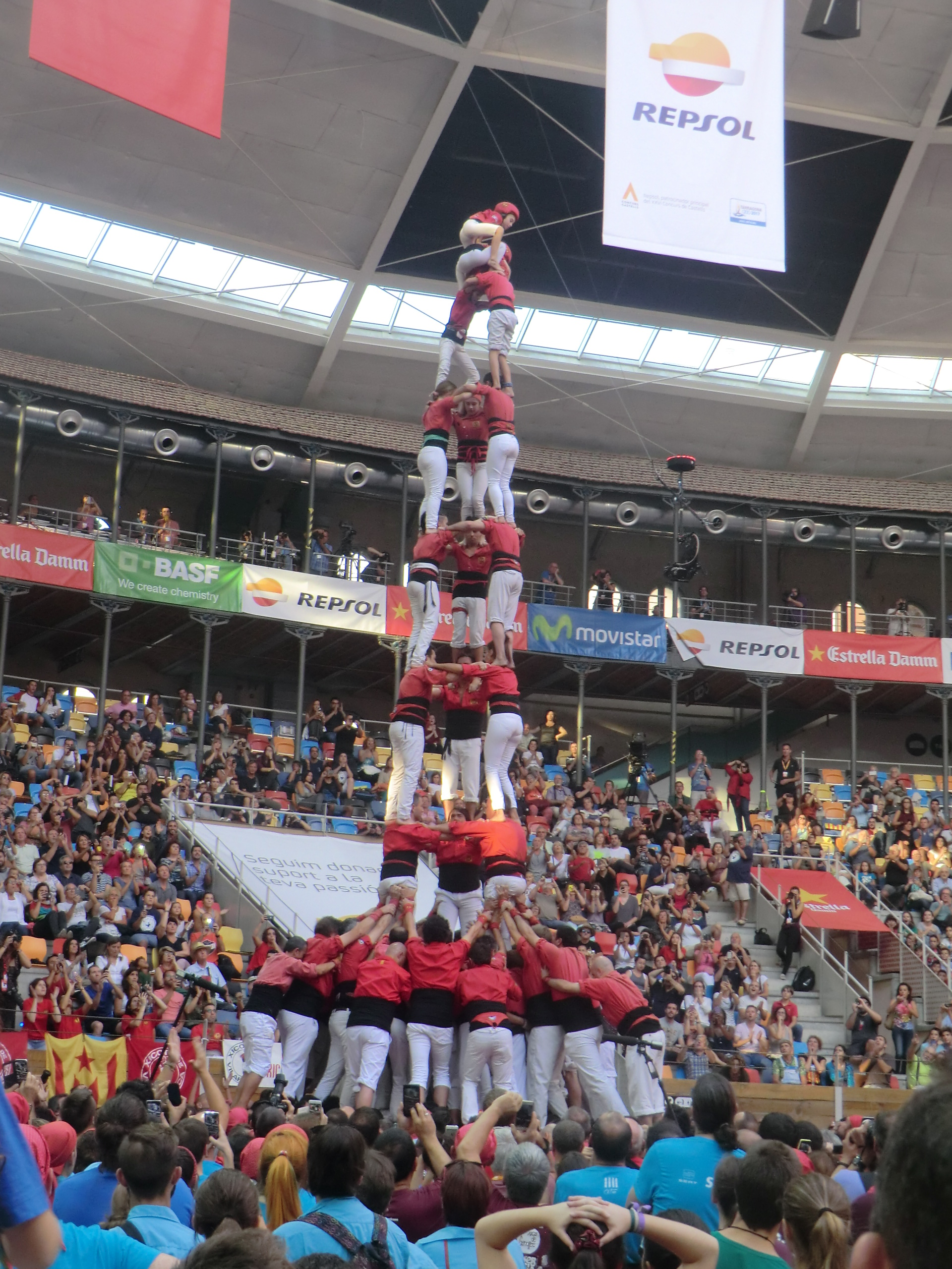 3 de 9 amb folre carregat dels Xicots de Vilafranca al Concurs de Castells de Tarragona 2016